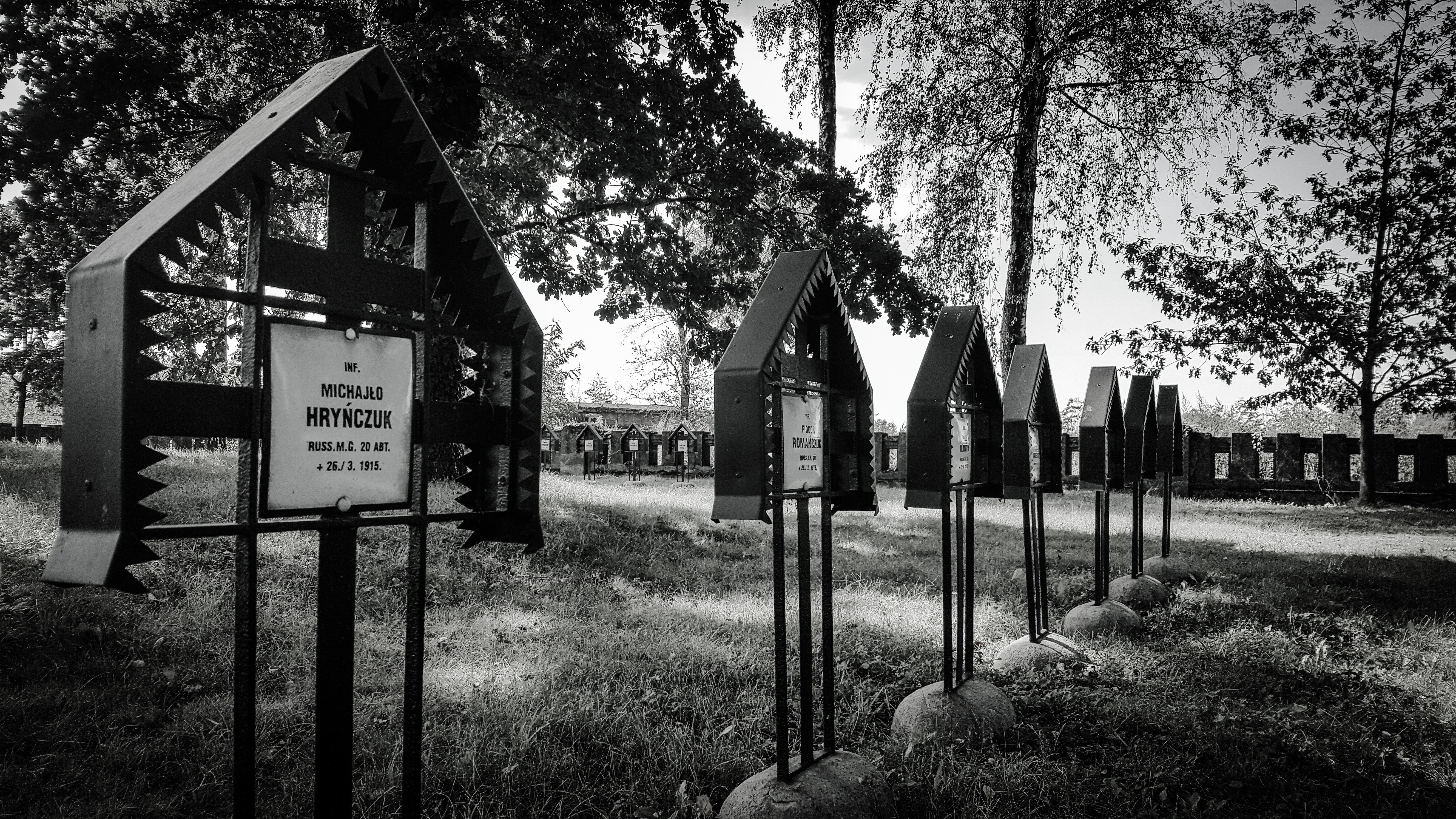 Cmentarz wojenny nr 208 z okresu I wojny światowej w Niedomicach. Nagrobki na mogiłach pojedynczych